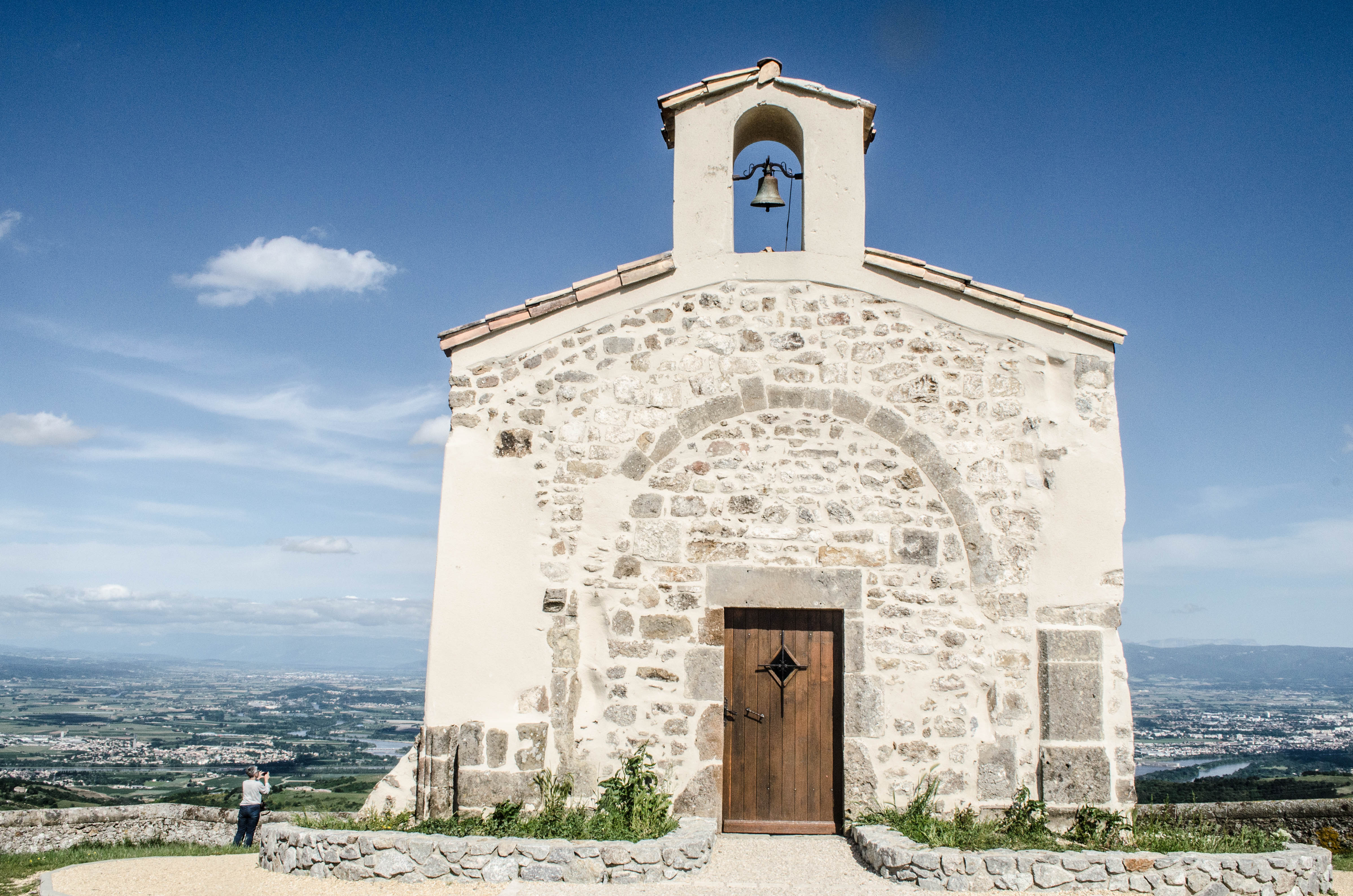 Saint-Romain-de-Lerps, Ardèche, France. Chapelle du Pic